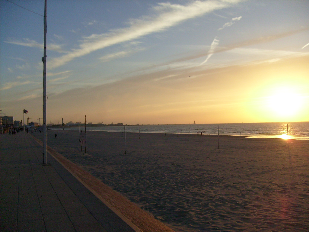 Coucher de Soleil vu depuis la digue de Malo les Bains (59)